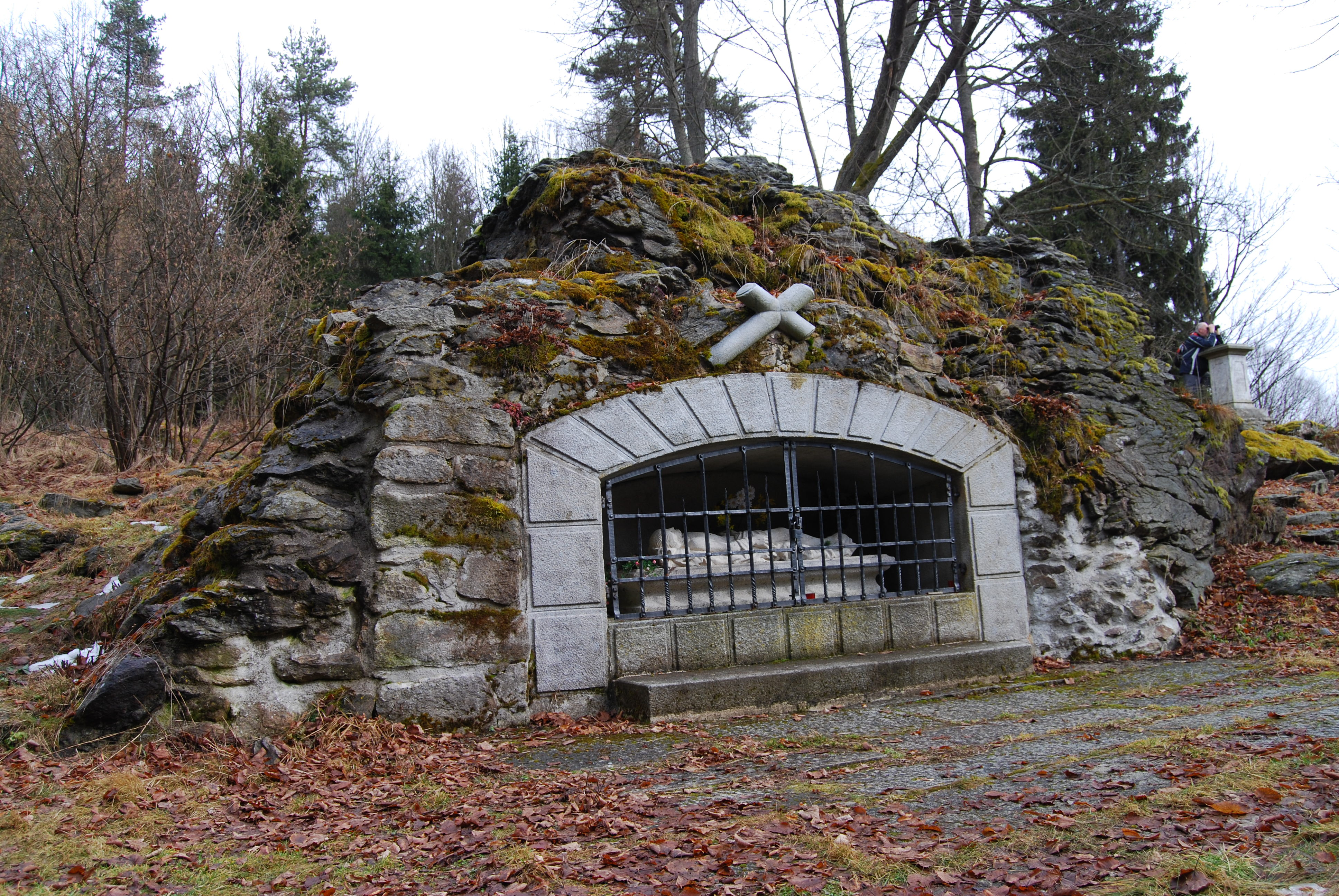 Křížová cesta na vrchu Kamenáč je tvořena 12 zastaveními - 12 naprosto stejných kapliček, vytesaných ze tří kusů dioritu. Dvě zastavení: XII. - ( Ježíš na kříži umírá ) a XIV.- ( Ježíš je uložen do hrobu) jsou pojata jiným způsobem. Jednotlivá zastavení : XIV. - ( Ježíš je uložen do hrobu) na vrchu Kamenáč. Volary. Okres Prachatice. Česká republika.